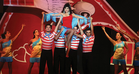 Vanessa Silva na peça "Agarra que é honesto"